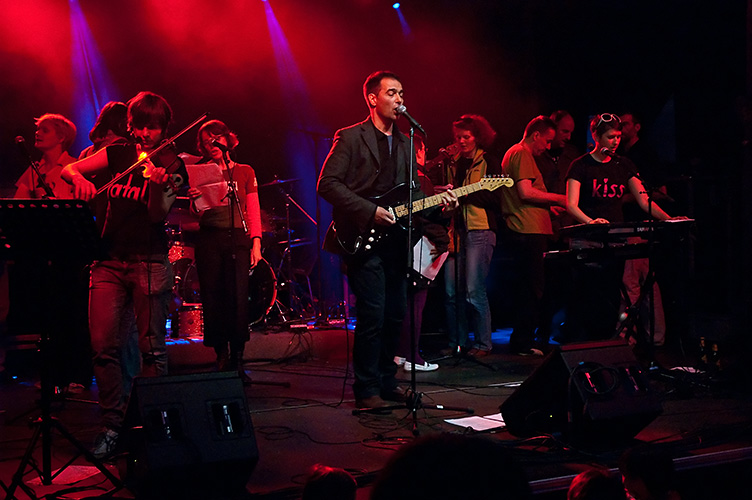 Vlada Divljan, Komponist und Sänger der 1980er New Wave-Band Idoli, (guitar, voc) + Renée Winter, First Fatal Kiss (keyboards, voc) + Birgit Michlmayr, First Fatal Kiss (violin, voc) + Gregor Mahnert, Nitro Mahalia (drums) + Romeo Bissuti, Scrooge (ebass) spielen Idoli-Songs.